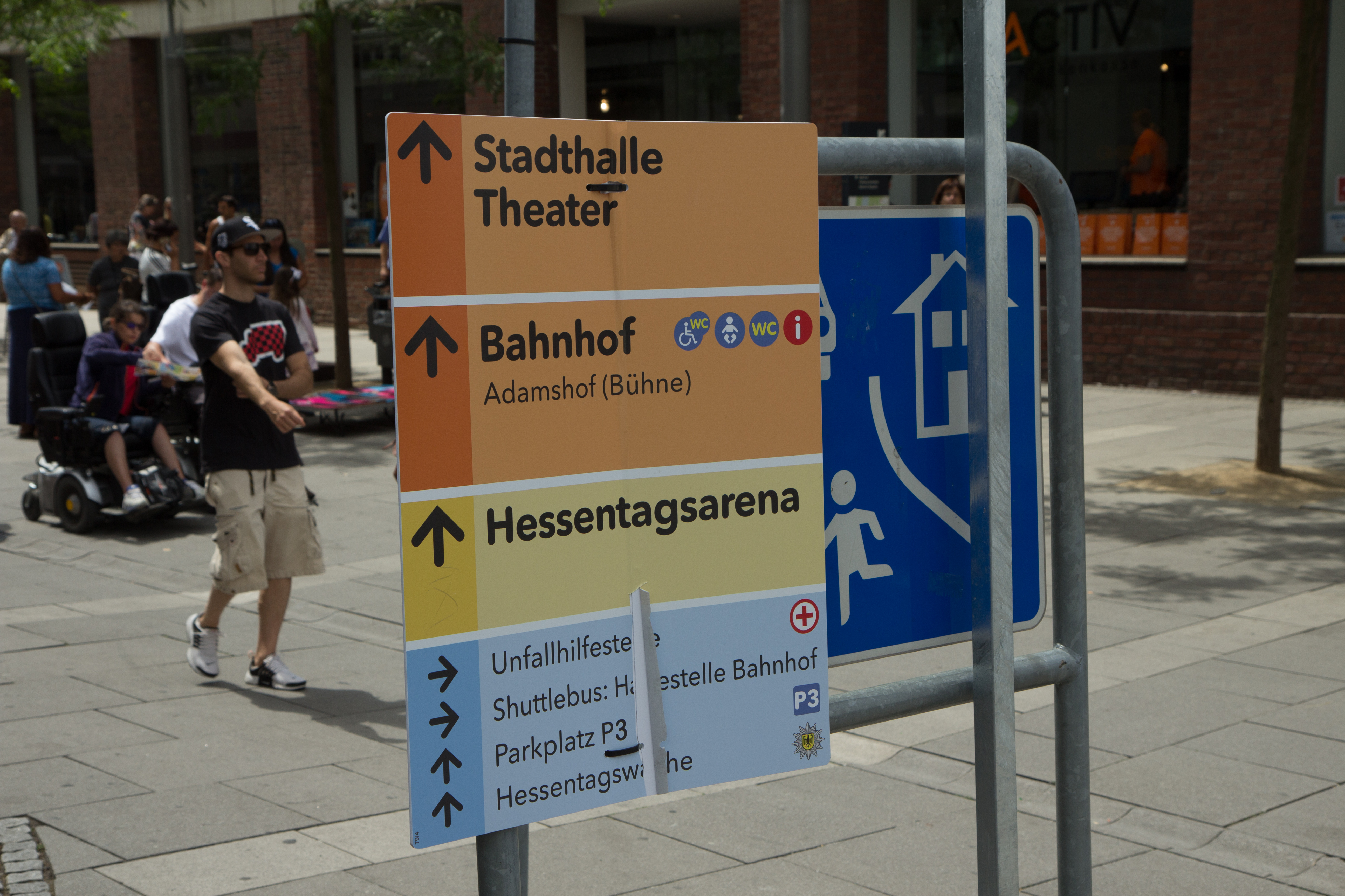 Umzug zum Hessentag in Rüsselsheim am 18. Juni 2017